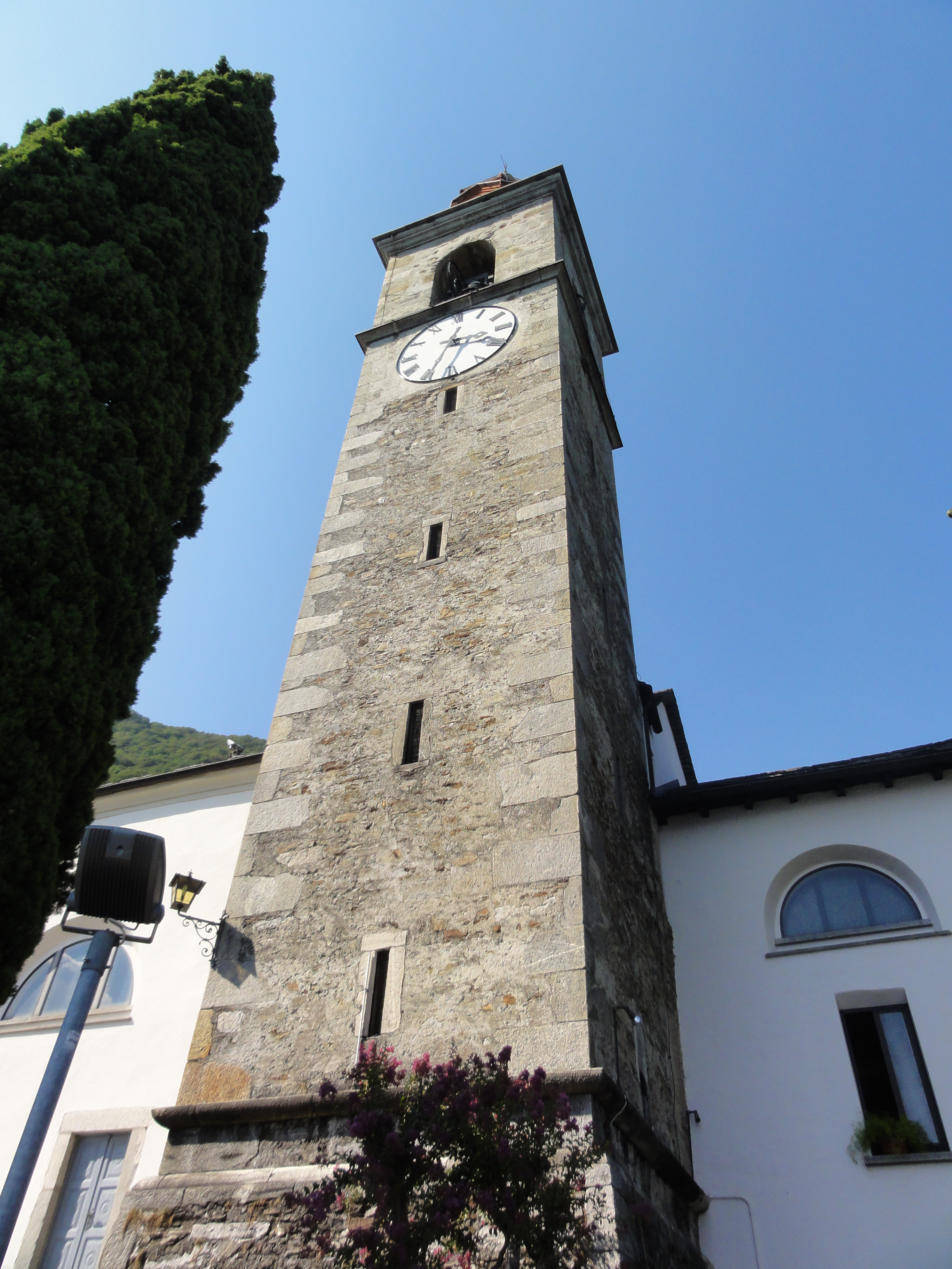 Schweiz - Ronco sopra Ascona (TI). Glockenturm der Kirche St Martino